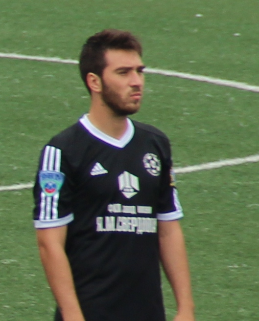 Dmitri Shilov